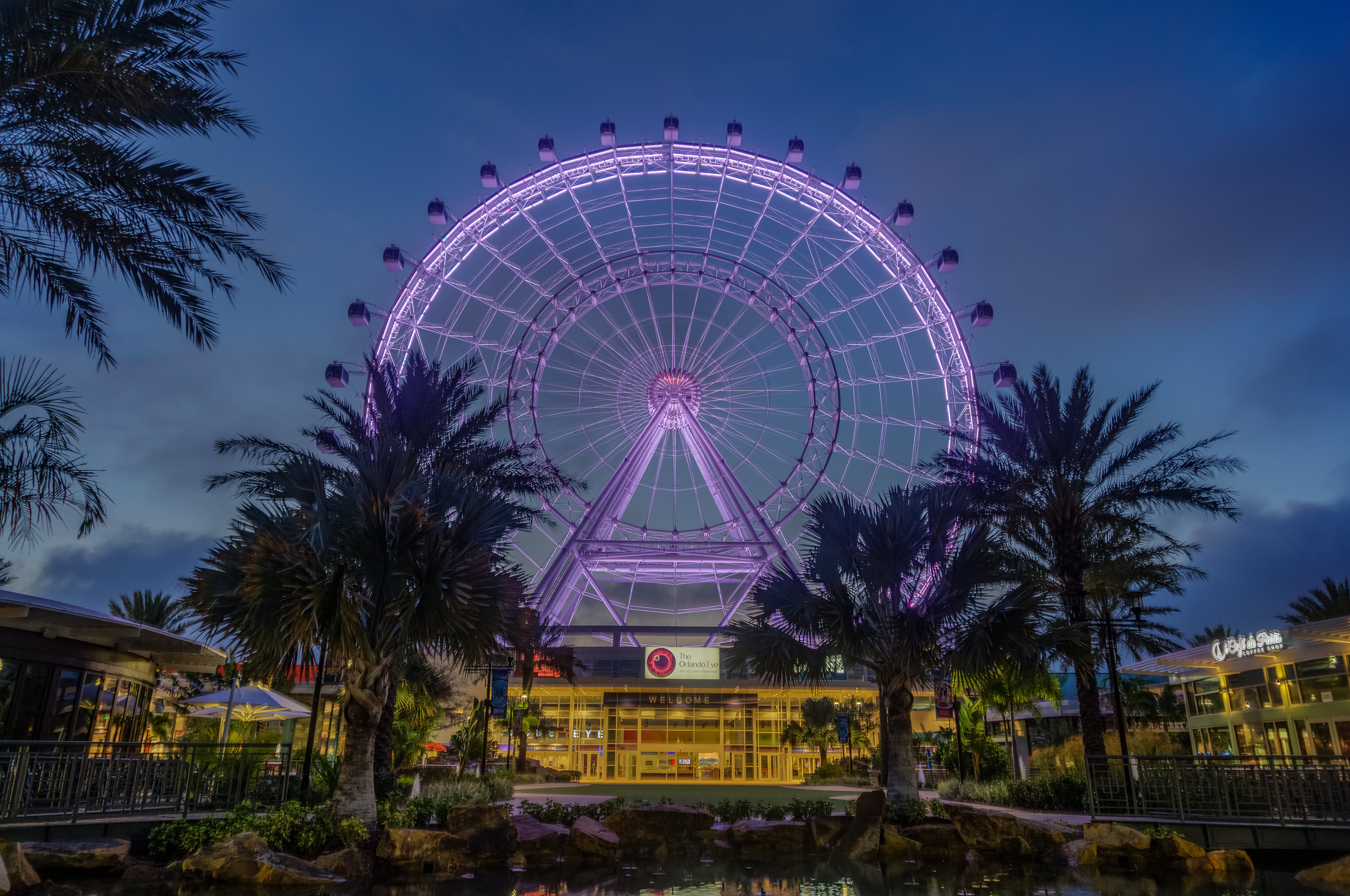 Orlando Eye